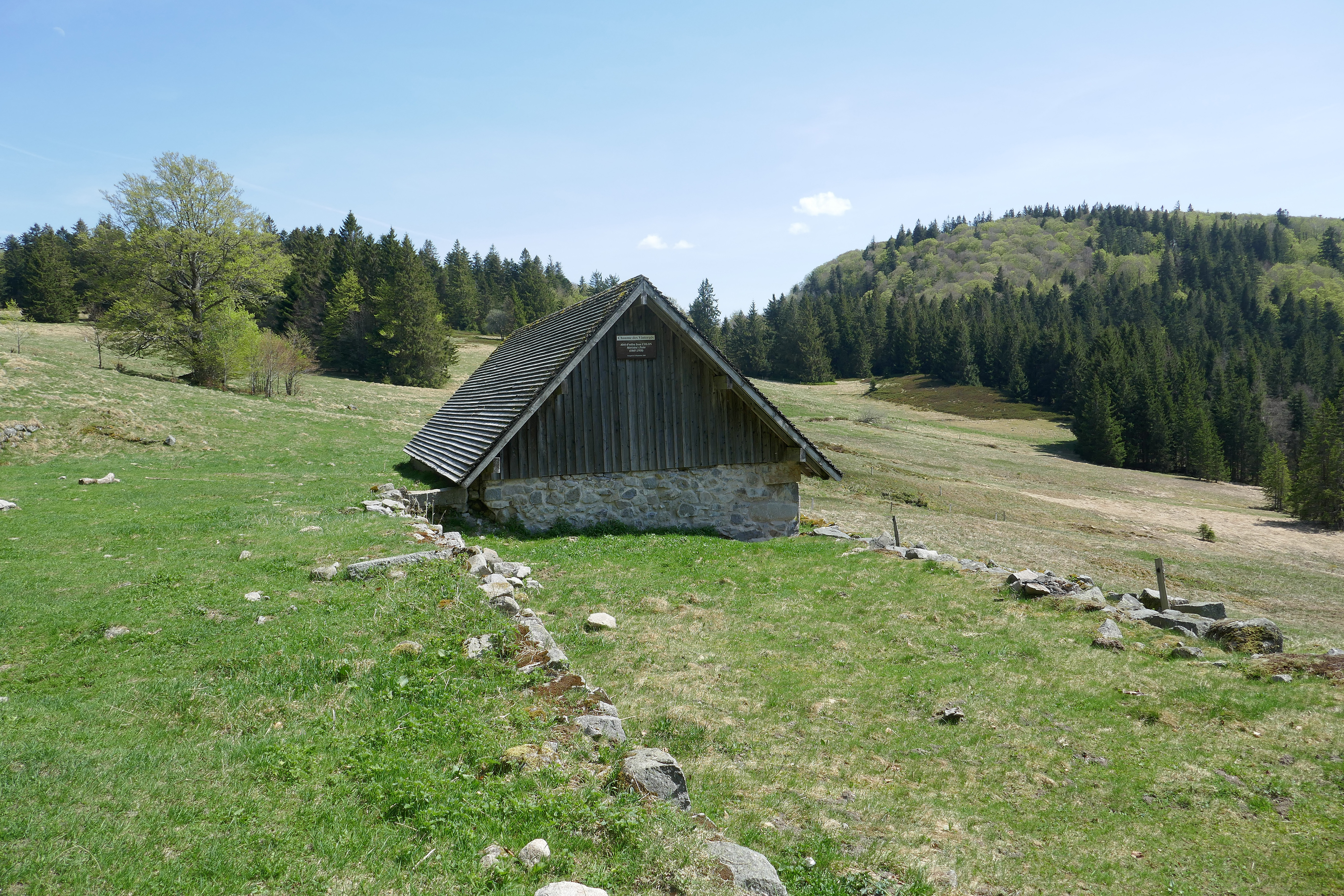 Abri du chaume des Vintergés, dans la Réserve naturelle nationale du massif du Ventron (Vosges).